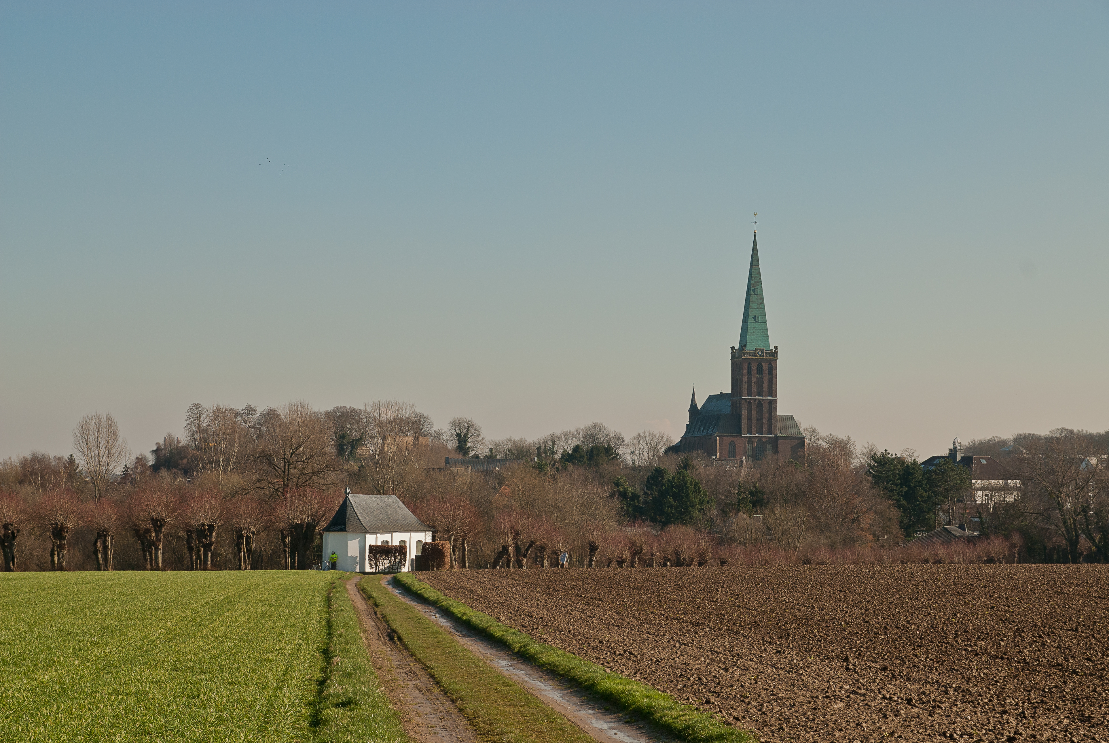 Blick von der Anhöhe beim Klosterhof auf den Burg und Kirchberg in Heinsberg